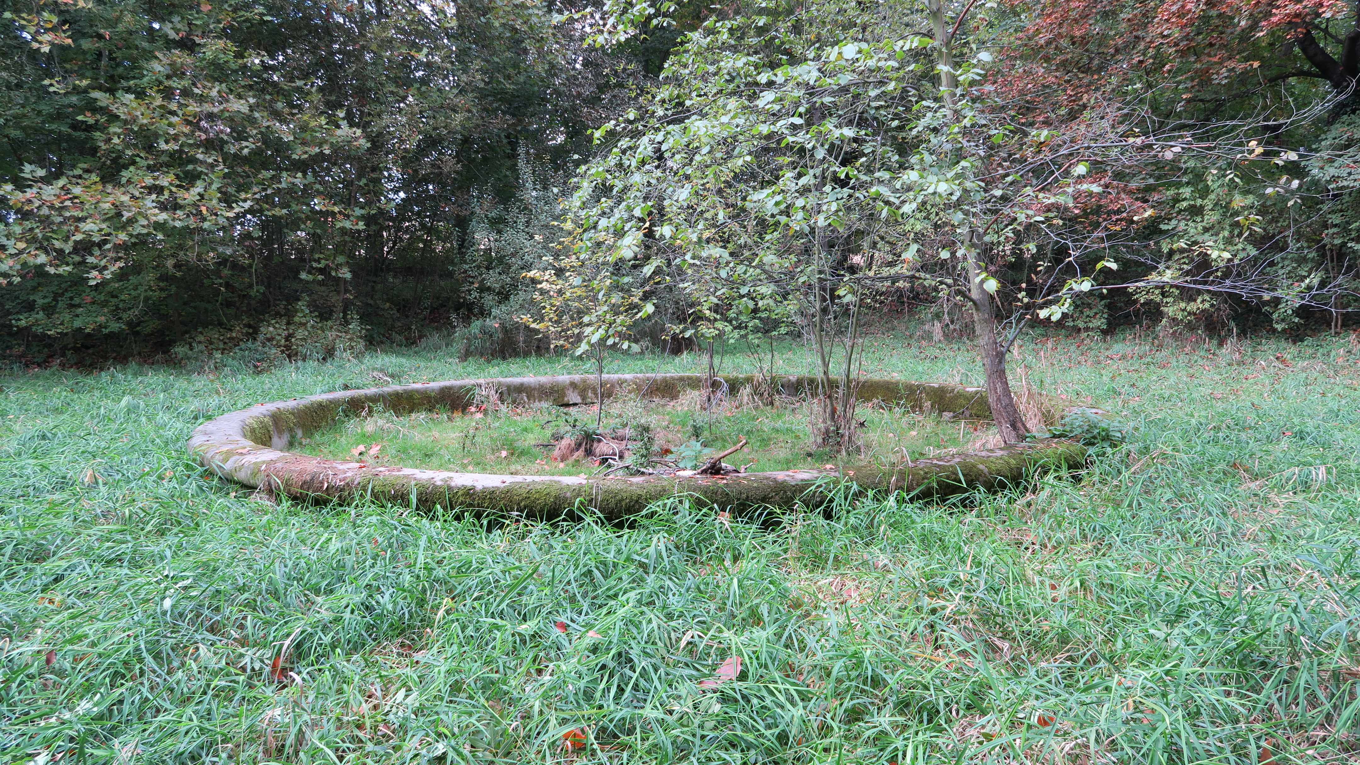 Ruiny fontanny w parku pałacowym w Jerzmanicach-Zdroju